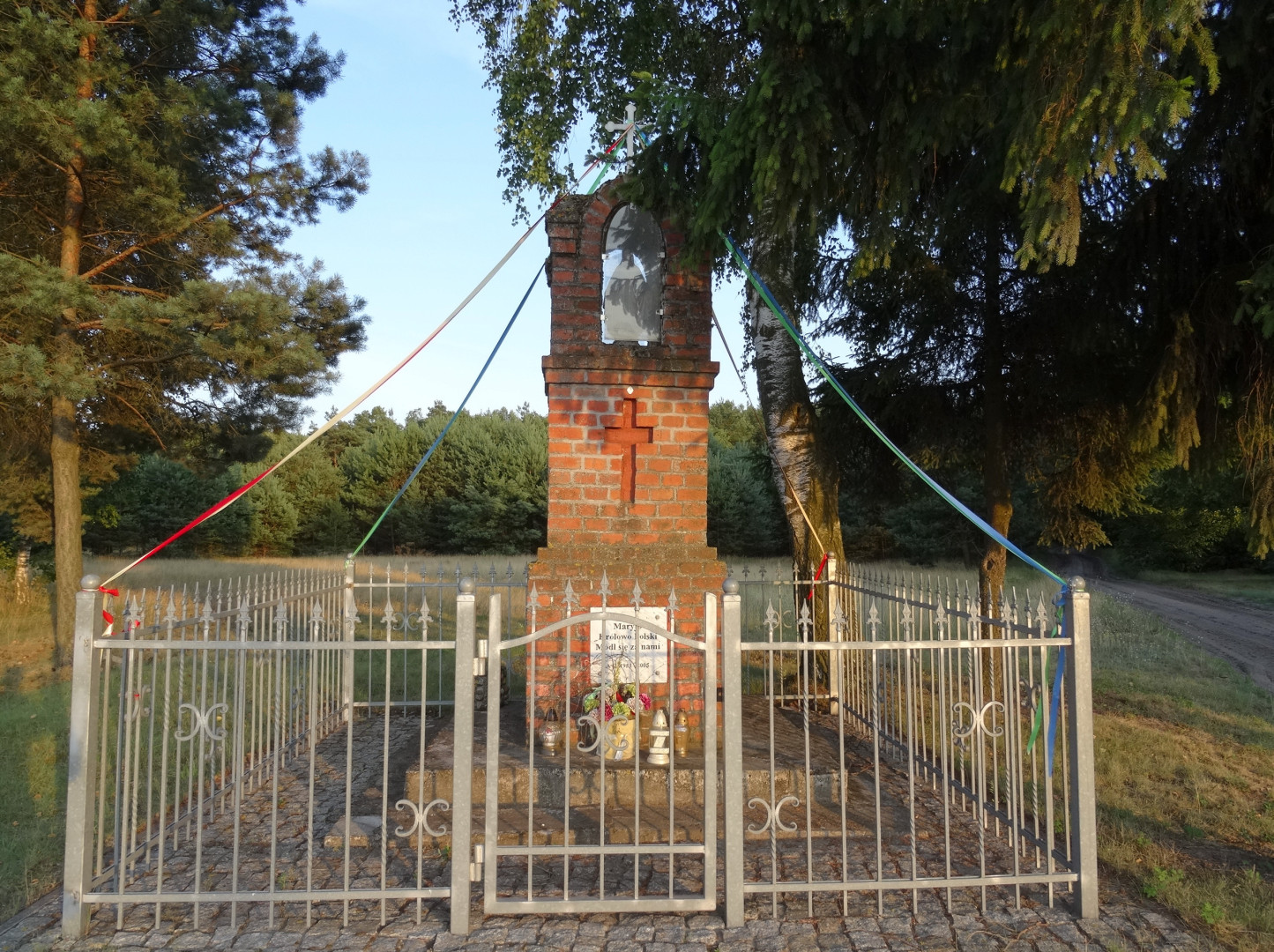 Jakubowo - kapliczka przydrożna, gmina Nowa Wieś Wielka, powiat bydgoski